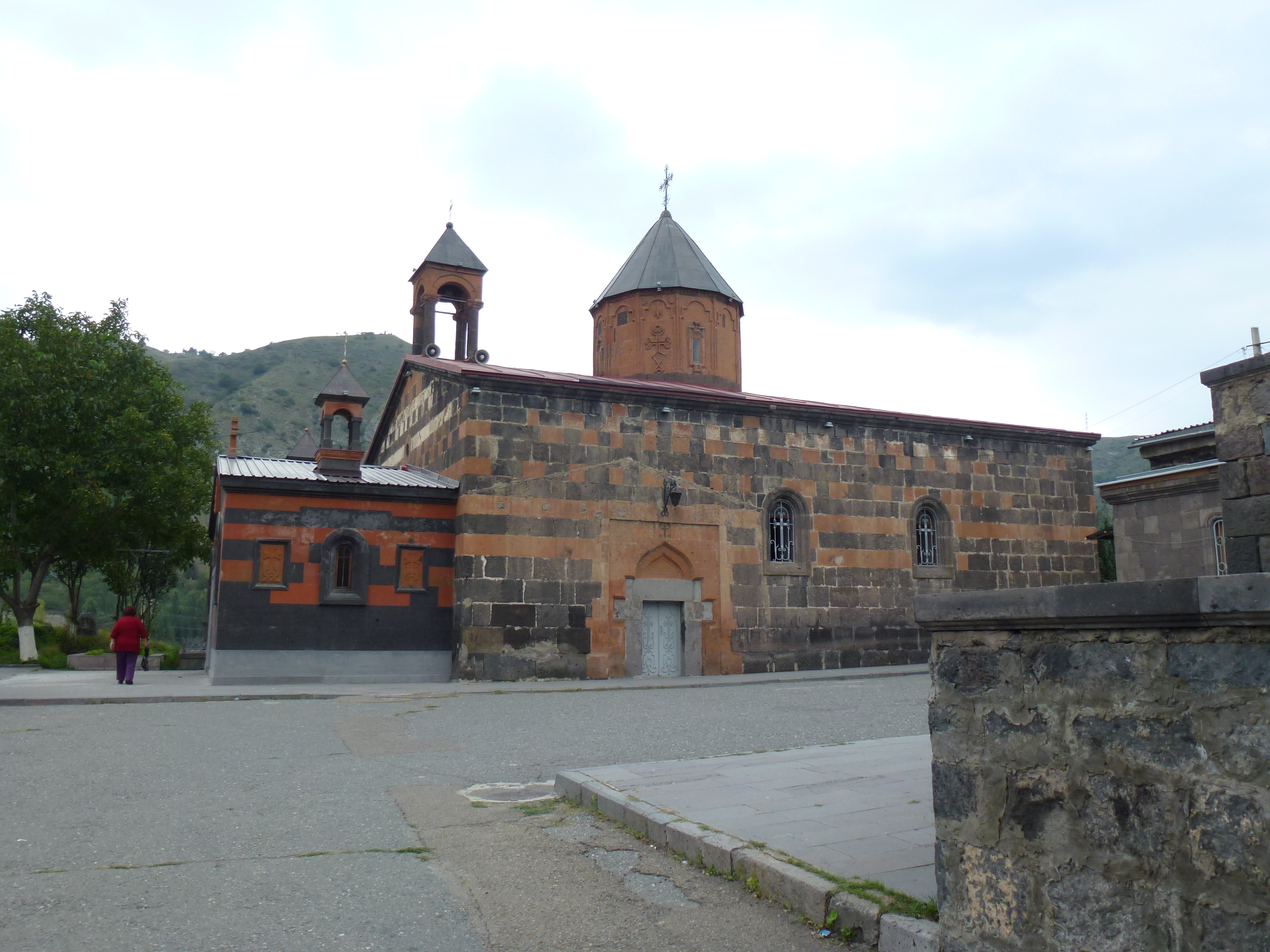 Վանաձորի Սուրբ Աստվածածին եկեղեցի 1/27